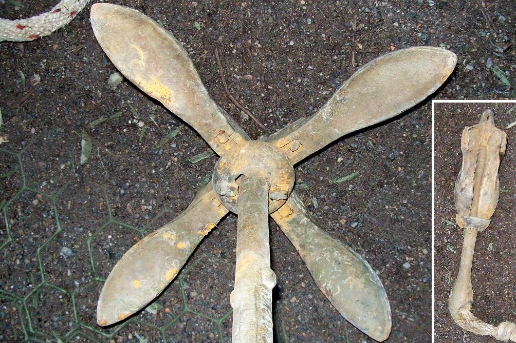 Klappdraggen Spannweite und Länge je 360mm, Masse 3,2kg, rechtes Teilbild: zusammengeklappt